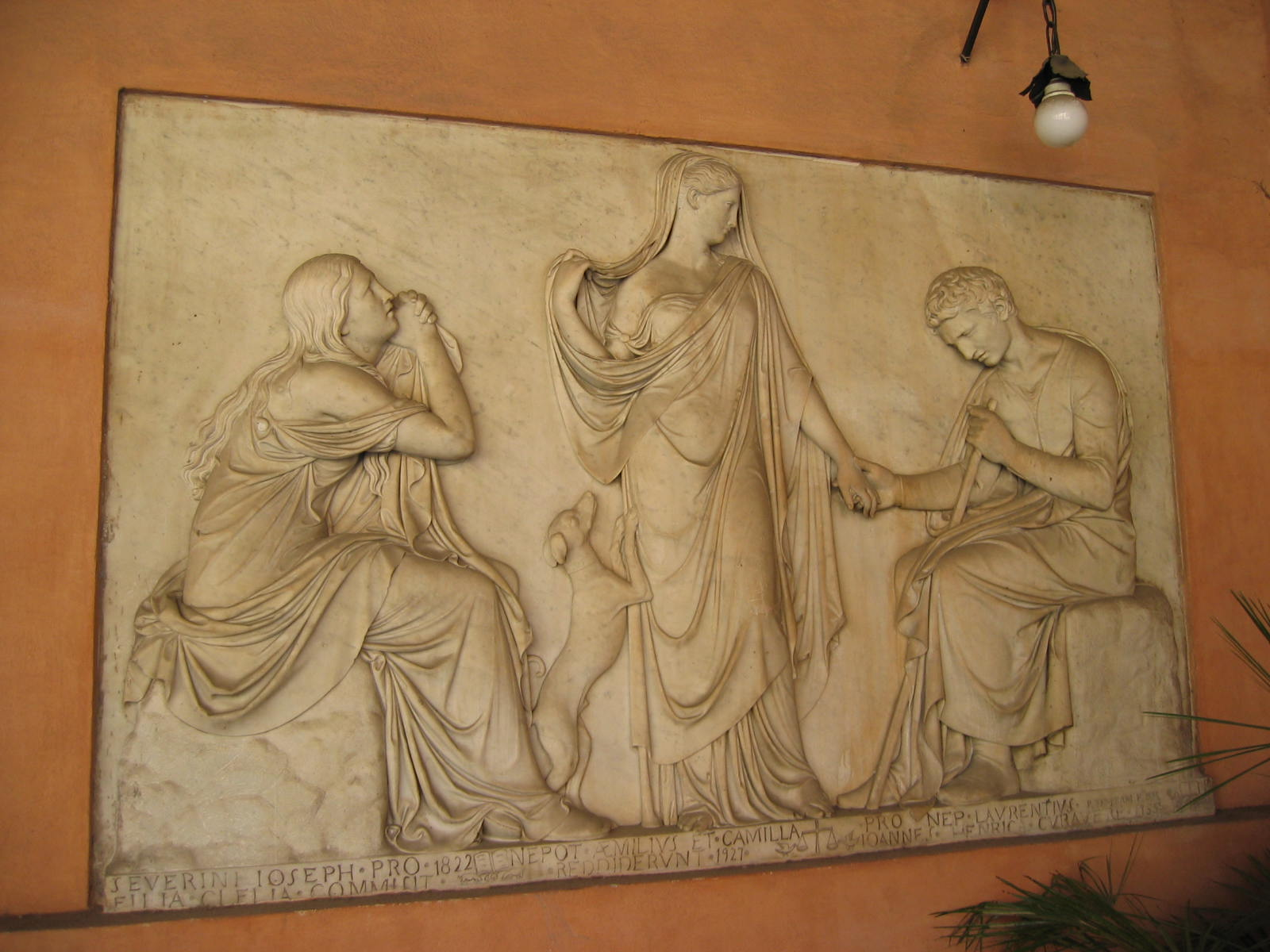 Pietro Tenerani - "Monument to Clelia Severini" (1825). San Lorenzo in Lucina, Rome. Picture by Torvindus.